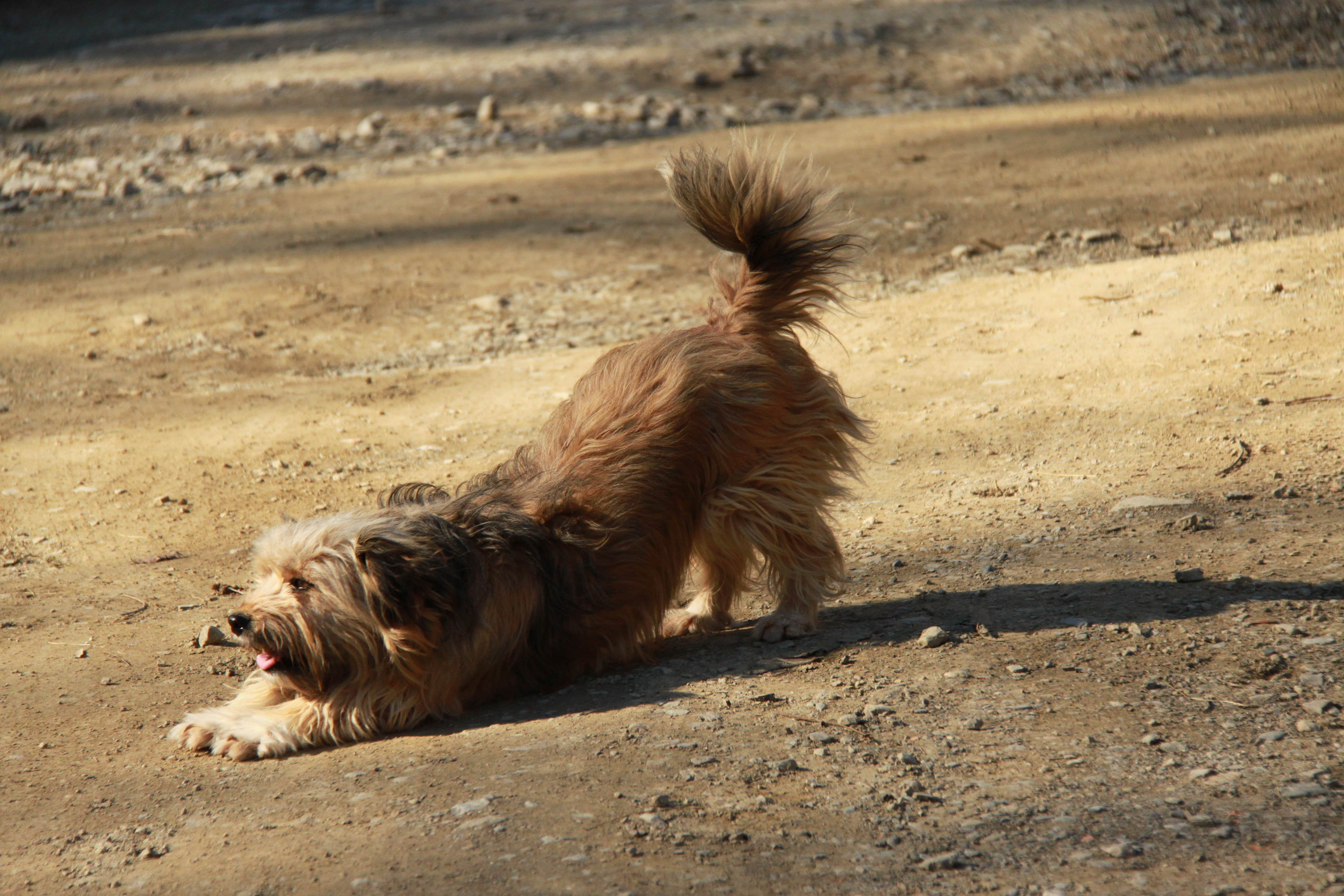 Alba - Octombrie 2010